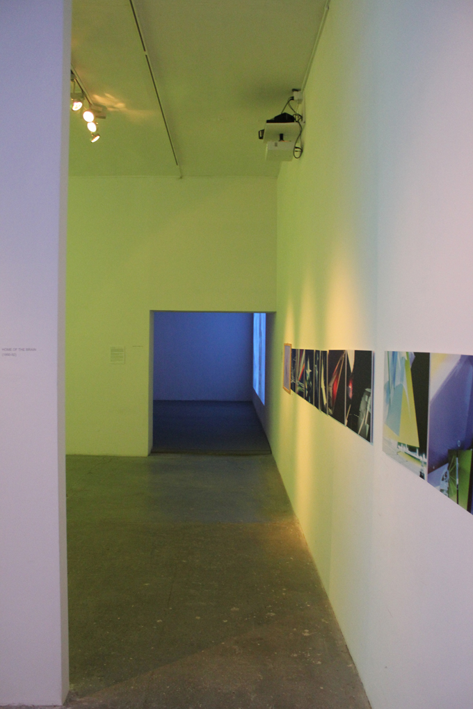 Centrum Sztuki Współczesnej "Łaźnia". Gdańsk, ul. Jaskółcza 1.